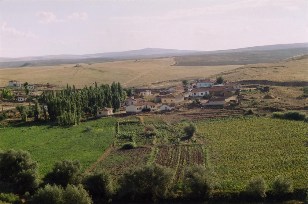 Yozgat'a bağlı Şefaatli ilçesinde bulunan Hamzalı köyünden bir görüntü.